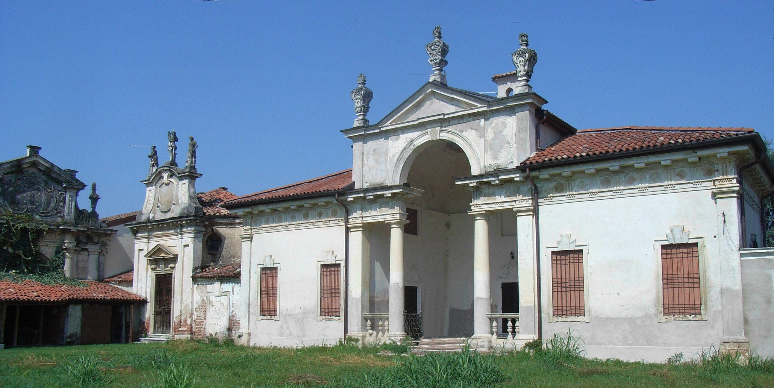 Villa Capra Barbaran a Santa Maria di Camisano Vicentino (provincia di Vicenza).